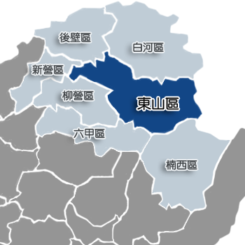 東山區相對位置